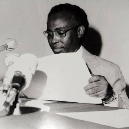 Qafár af: Dini Camad 1977